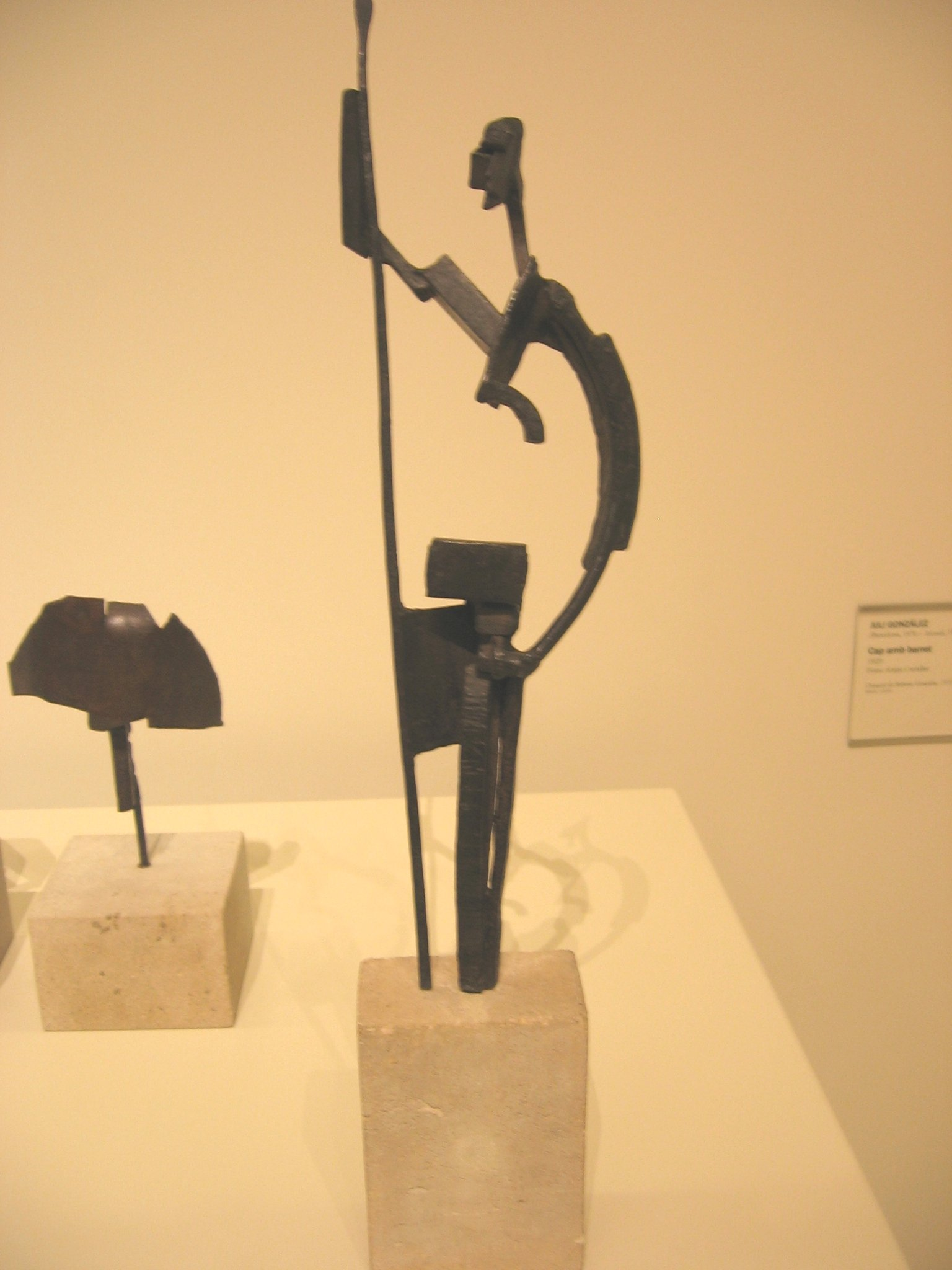 Juli González, Don Quijote, 1930, MNAC, Barcelona.